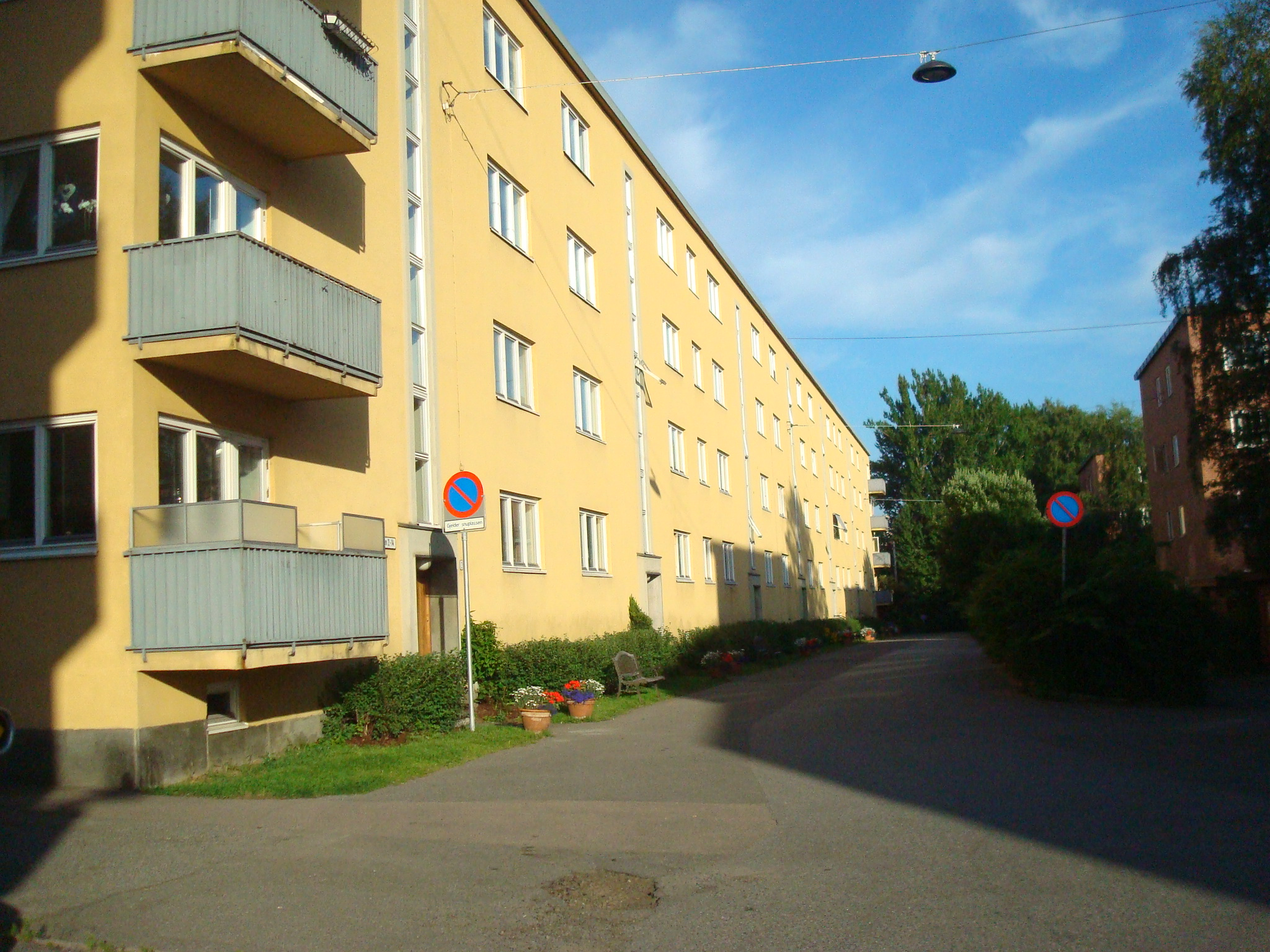 Bebyggelse (lamellblokk) i Siloveien i Oslo.